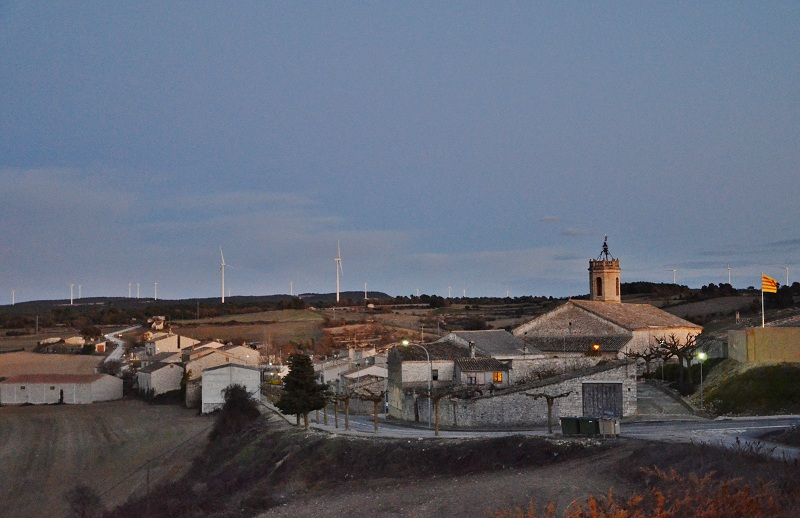 Església parroquial de Sant Jaume de Passanant (Passanant i Belltall)